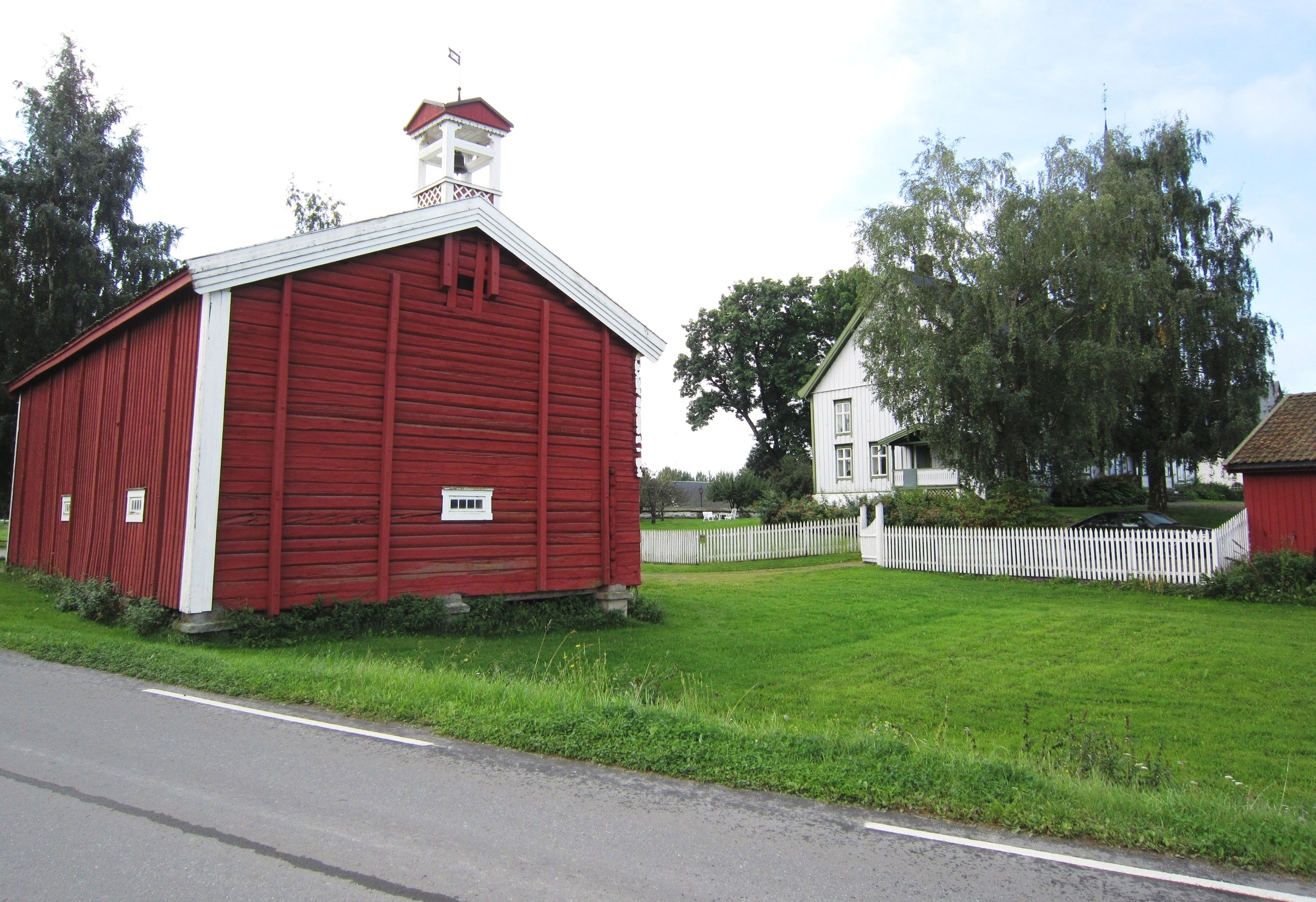 Stange prestegård ved fylkesvei 1856 (tidl. 193)